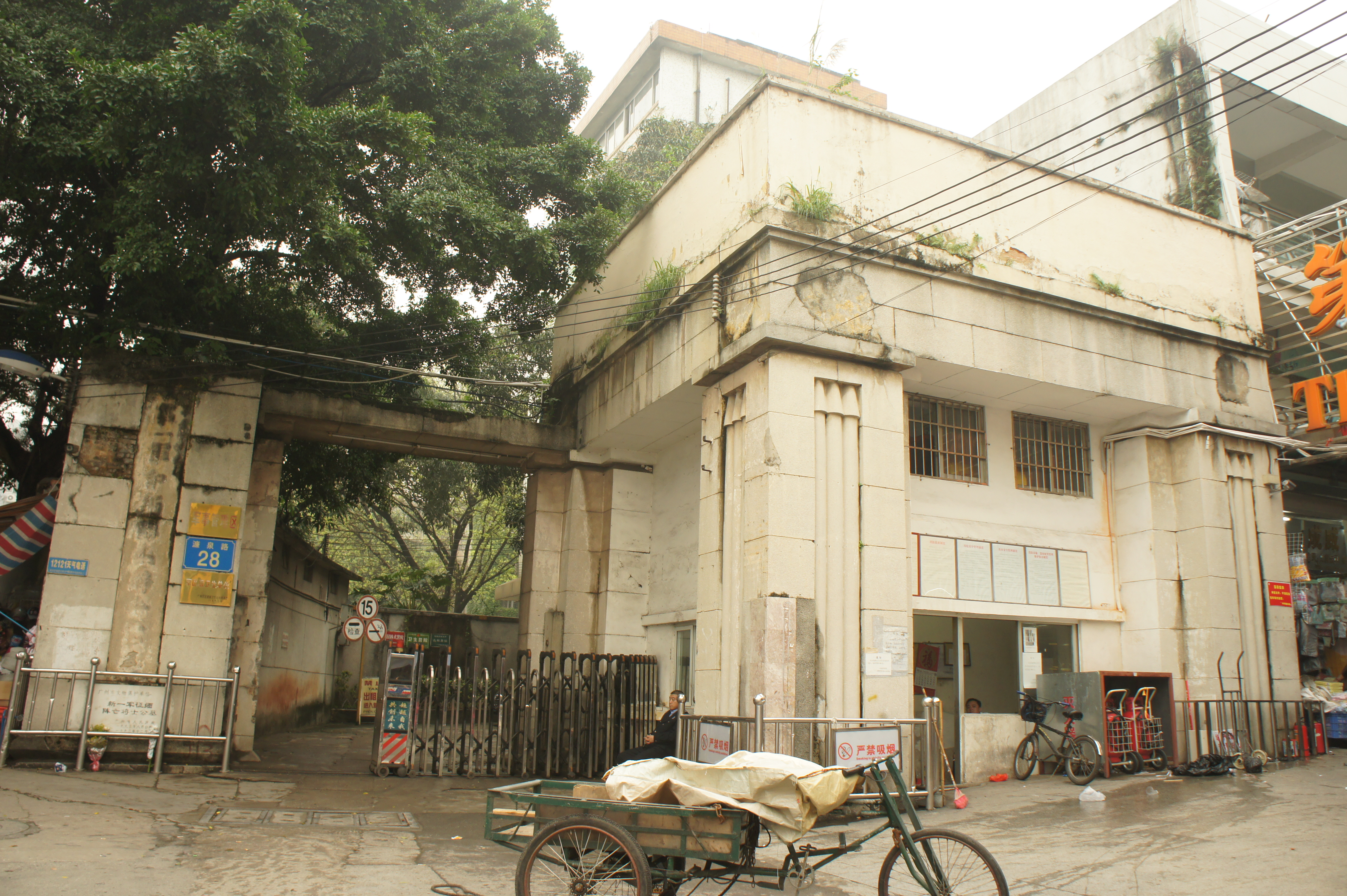 廣州市新一軍印緬陣亡將士公墓右門。